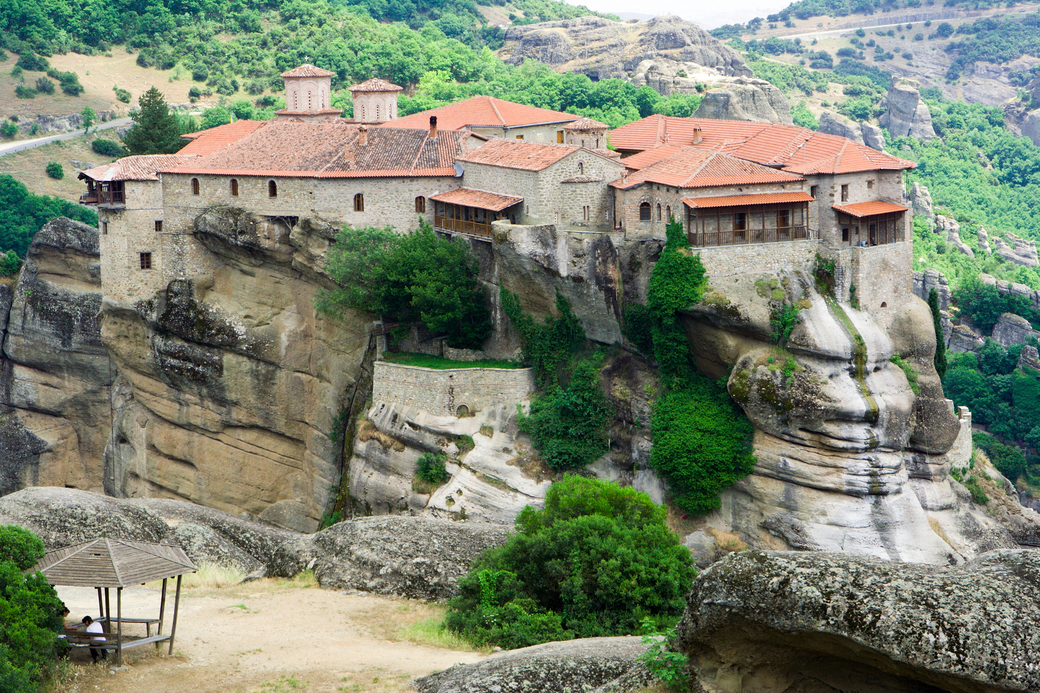 Moni Varlaam, Meteora, Greece